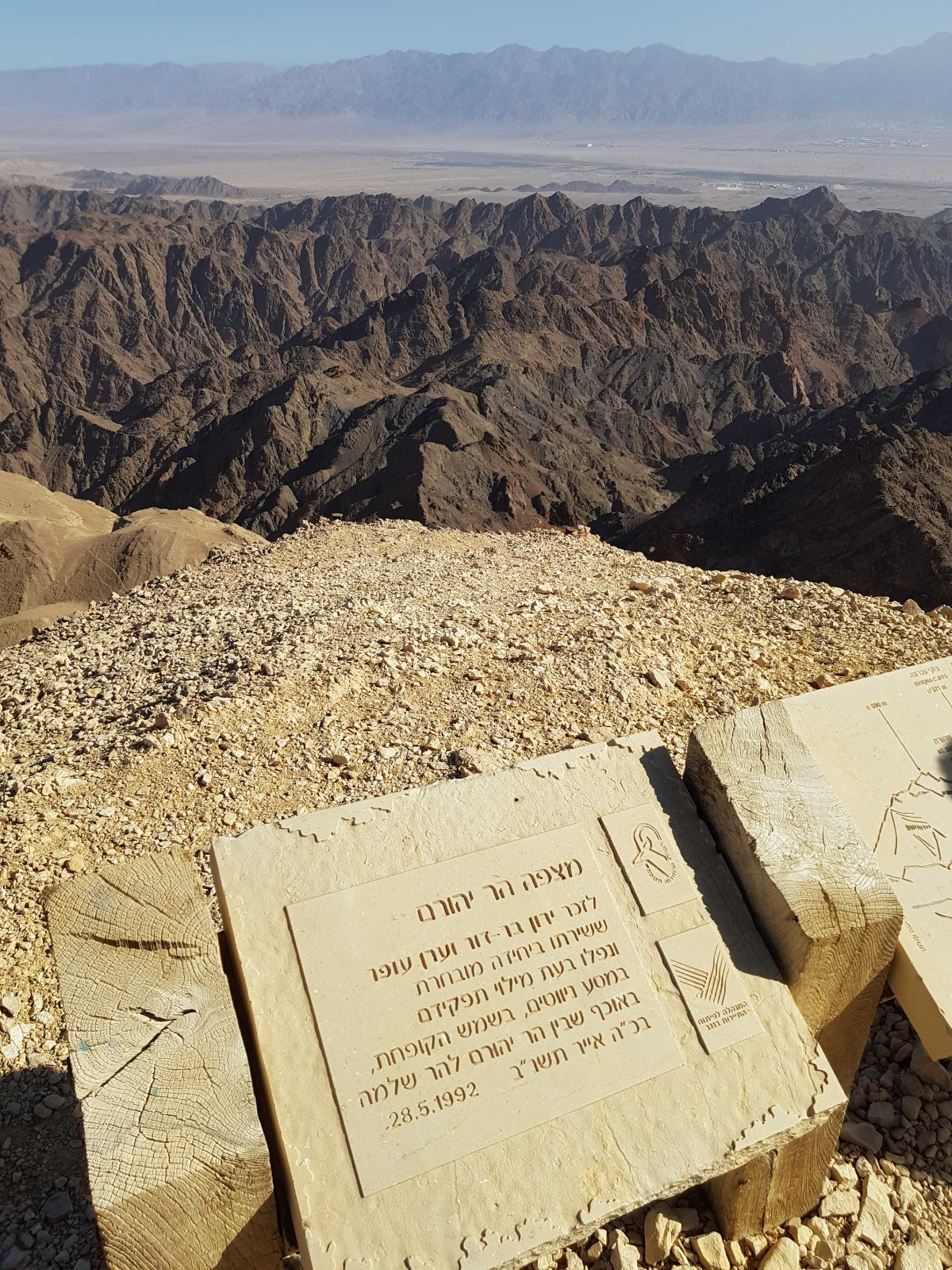 לזכר ירון בר-דור וערן עופר